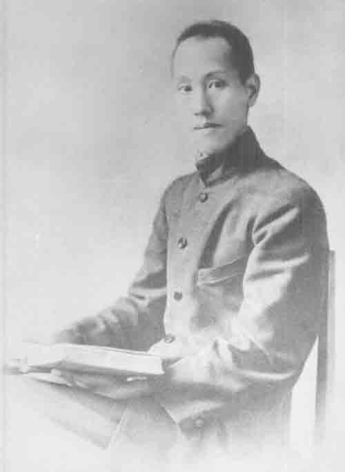 潘達微（1881年1月15日－1929年8月27日），又名心微，字鐵蒼，號景吾、影吾等，中國廣東番禺縣鹿步司(今廣州市天河區棠下街道)人，同盟會會員，知名書畫家、攝影家、記者。